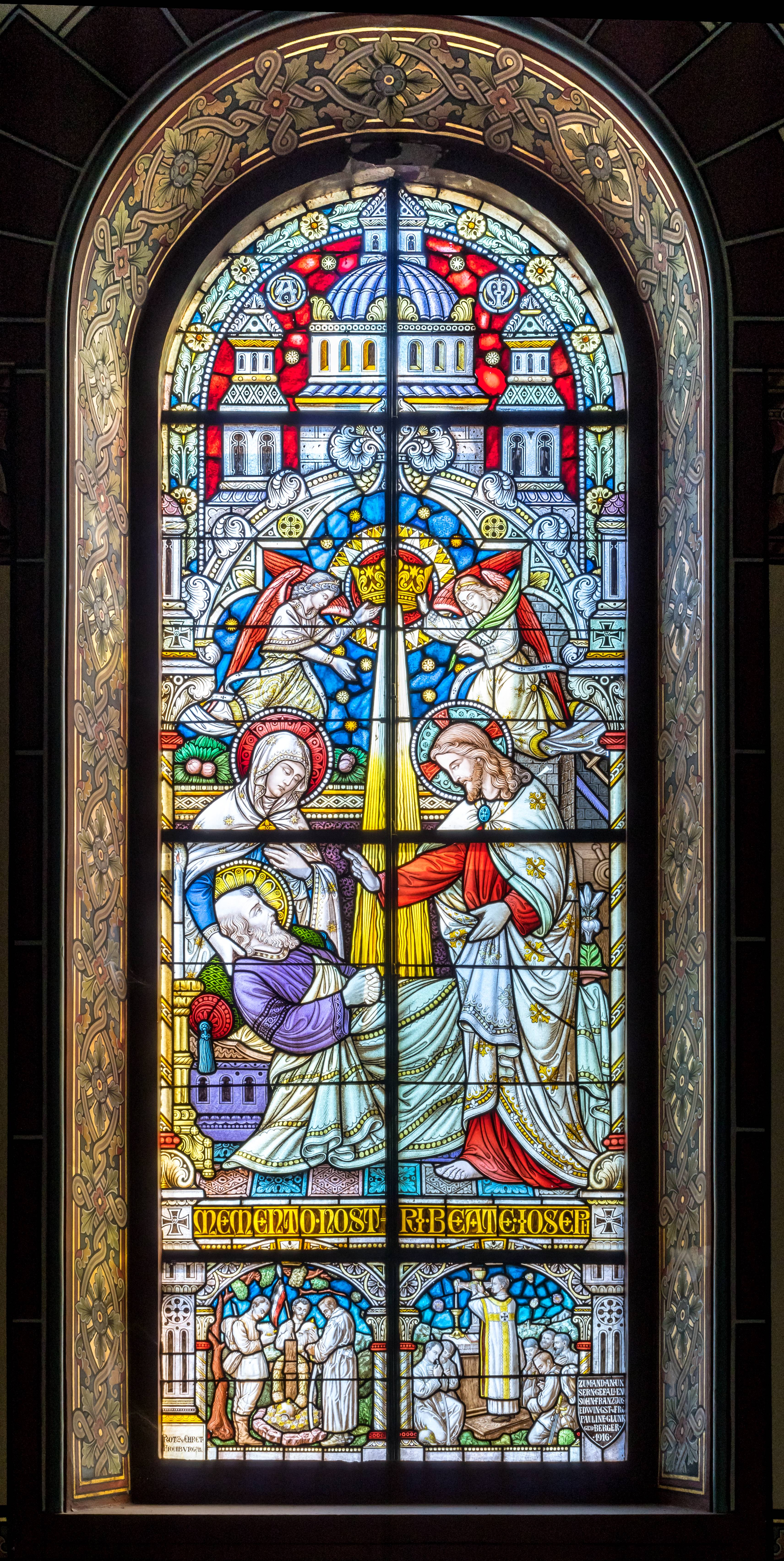 Glasfenster im Langhaus in der Kirche St. Peter und Paul in Bonndorf Inschrift: MEMENTO NOSTRI BEATE JOSEPH ZUM AND AN UN SERN GEFALLENEN SOHN FRANZ JOSEF EDWIN GST FR PAULINE GLUNK GEB BERGER 1916 Protz u. EHRET FREIBURG/BR.